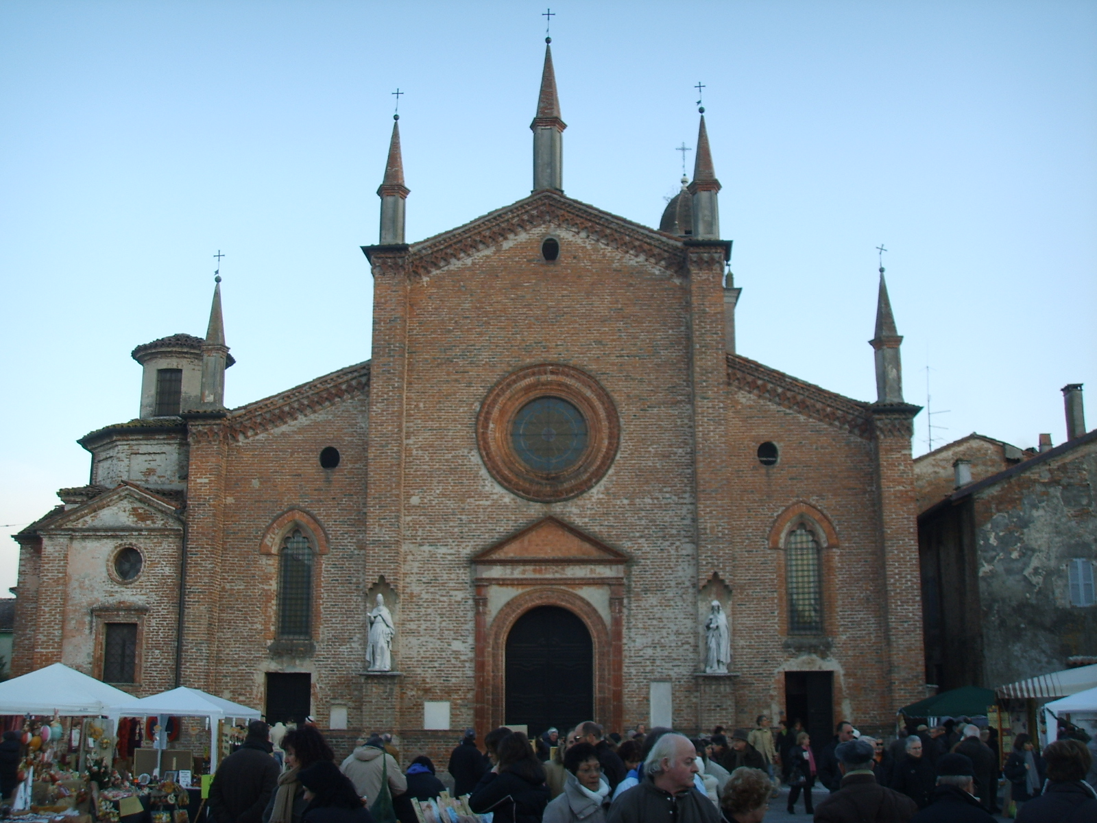 Zibello chiesa